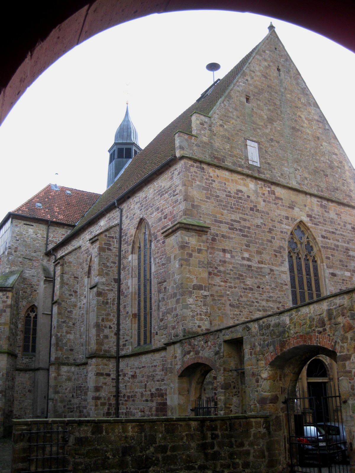 Kirche St. Clemens, Teil der Doppelanlage von Schloss und ehemaliger Benediktinerabtei Iburg in Bad Iburg, Niedersachsen, Deutschland